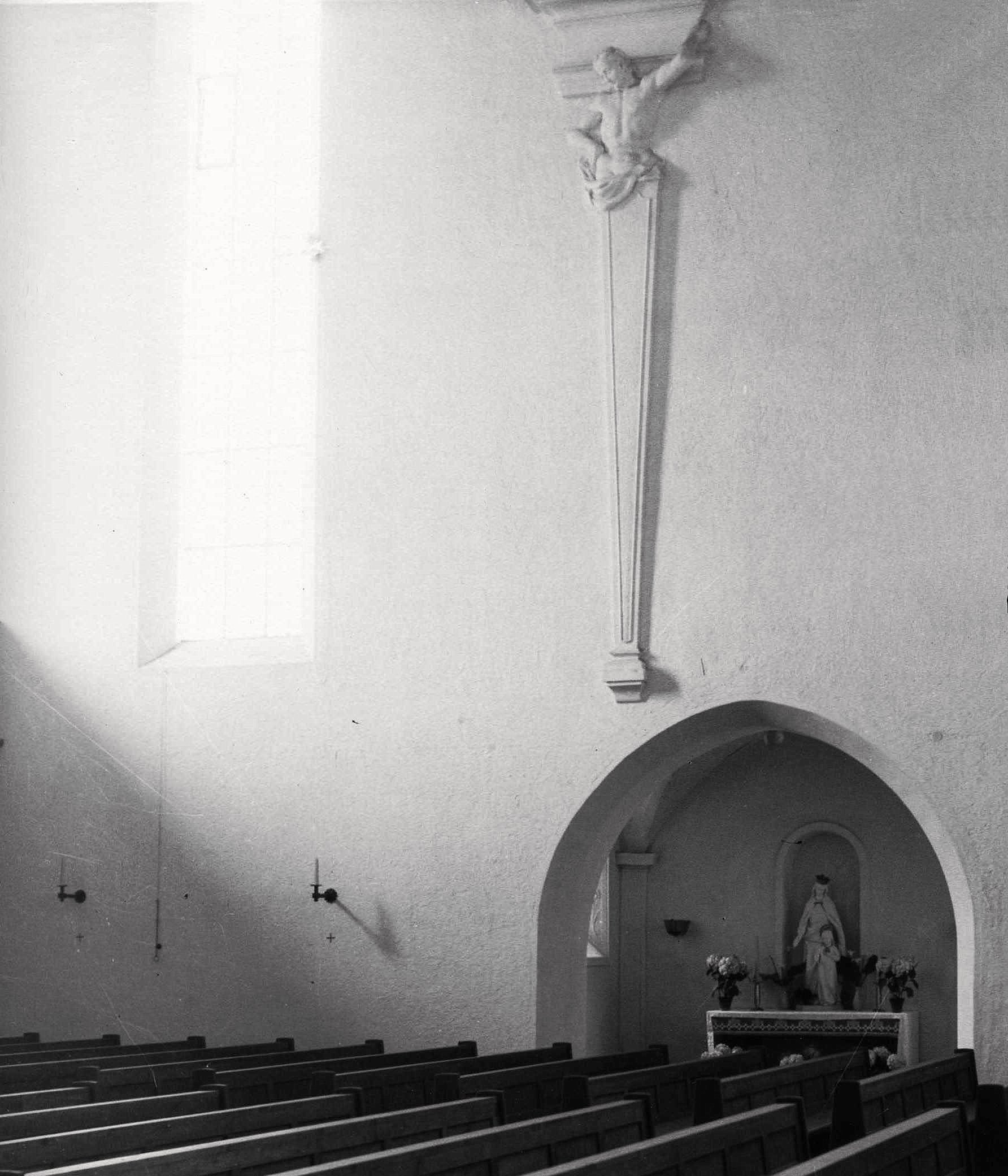 Heilbronn Kirche Peter + Paul